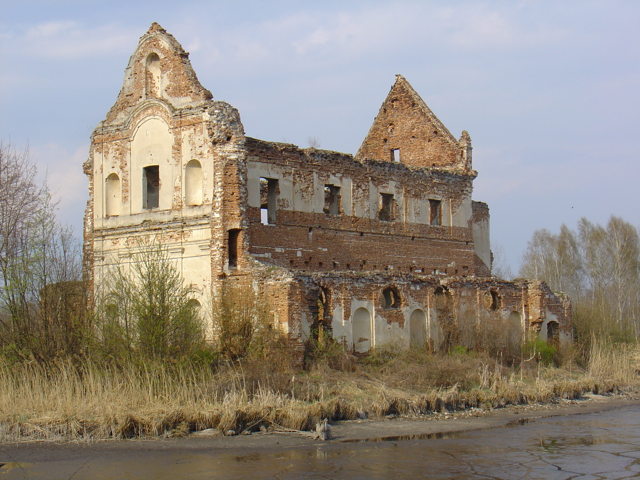 Chodel - kościół jezuitów p.w. Matki Boskiej Loretańskiej, ruina, 1736-50 (zabytek nr A/130 z 15.12.1966)